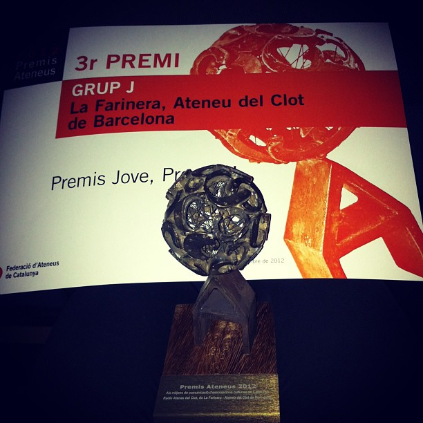 Guardons guanyats per Ateneu Clot